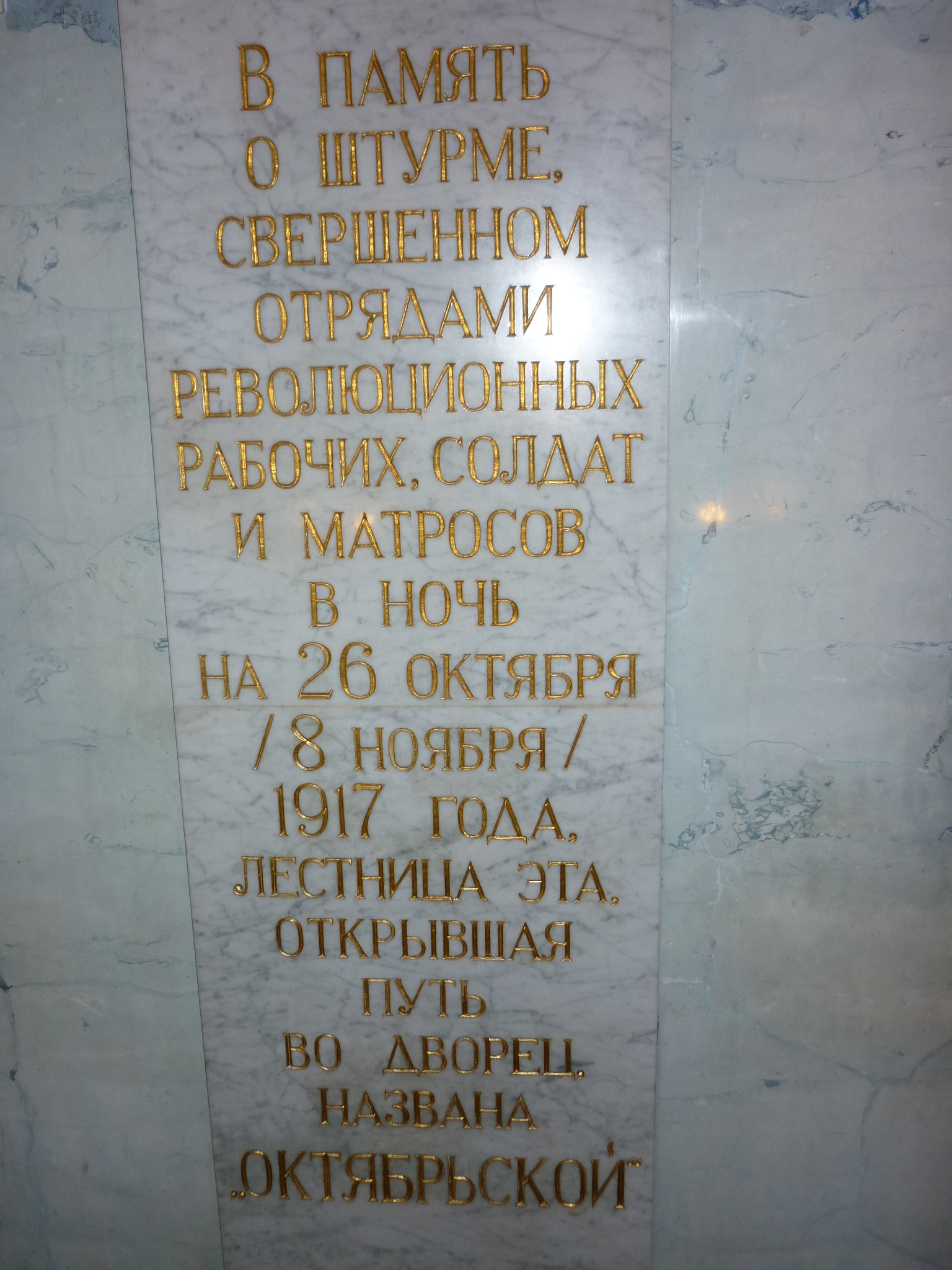 Мемориальная доска на Октябрьской лестнице в Зимнем дворце